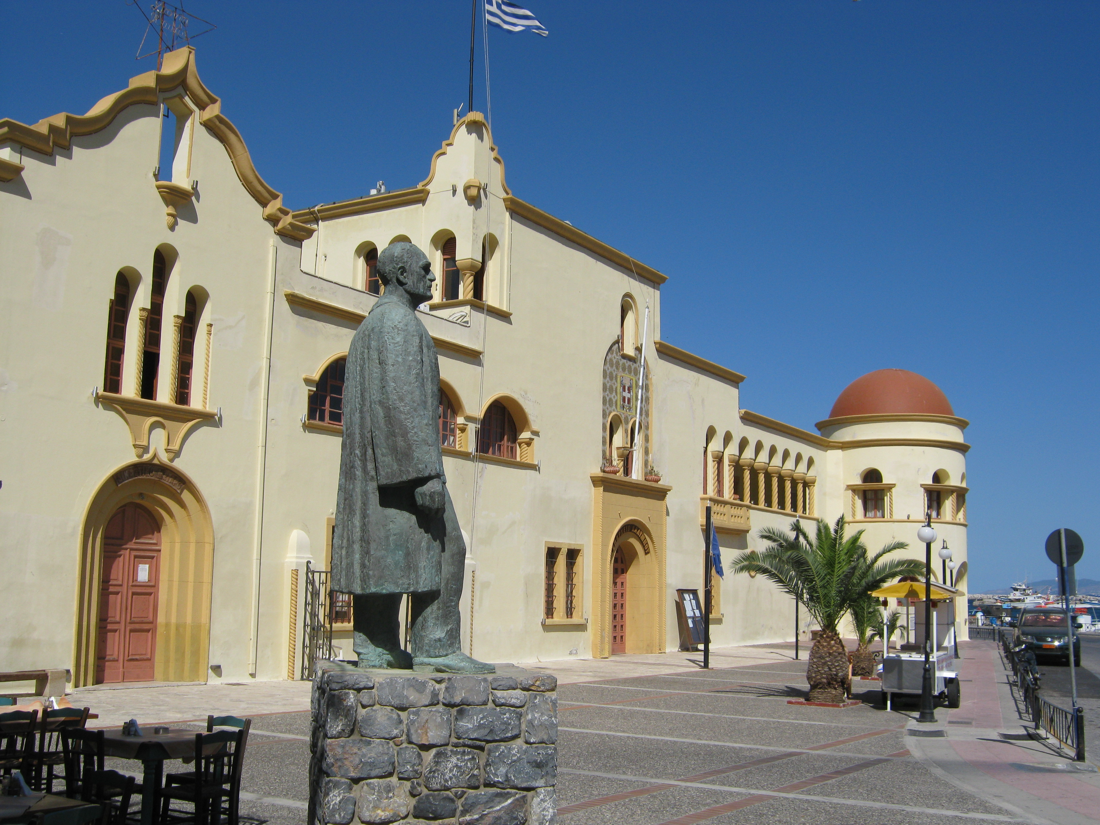 Kalymnos.